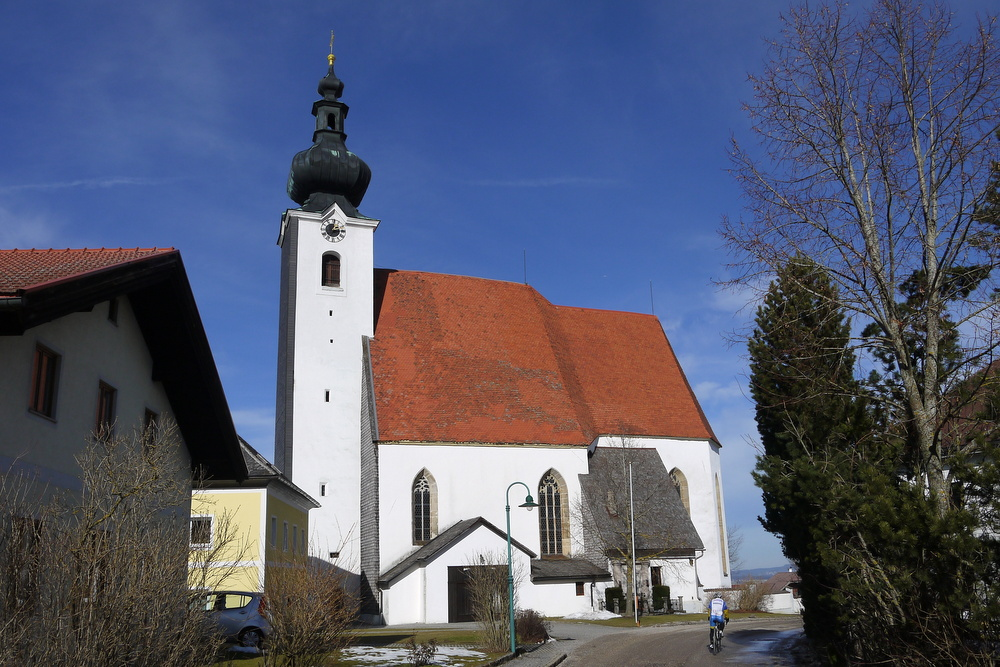 Kath. Pfarrkirche hl. Margaretha und Friedhof, Weißenkirchen im Attergau